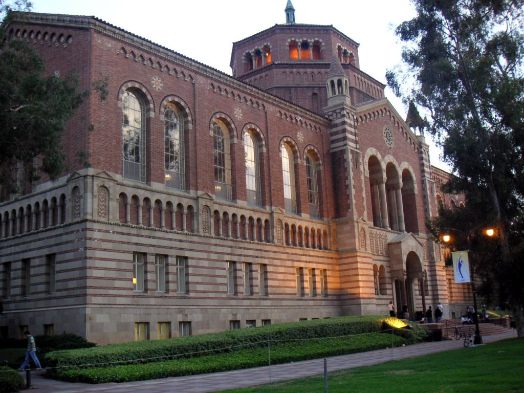 La bibliothèque de UCLA - Mai 2004